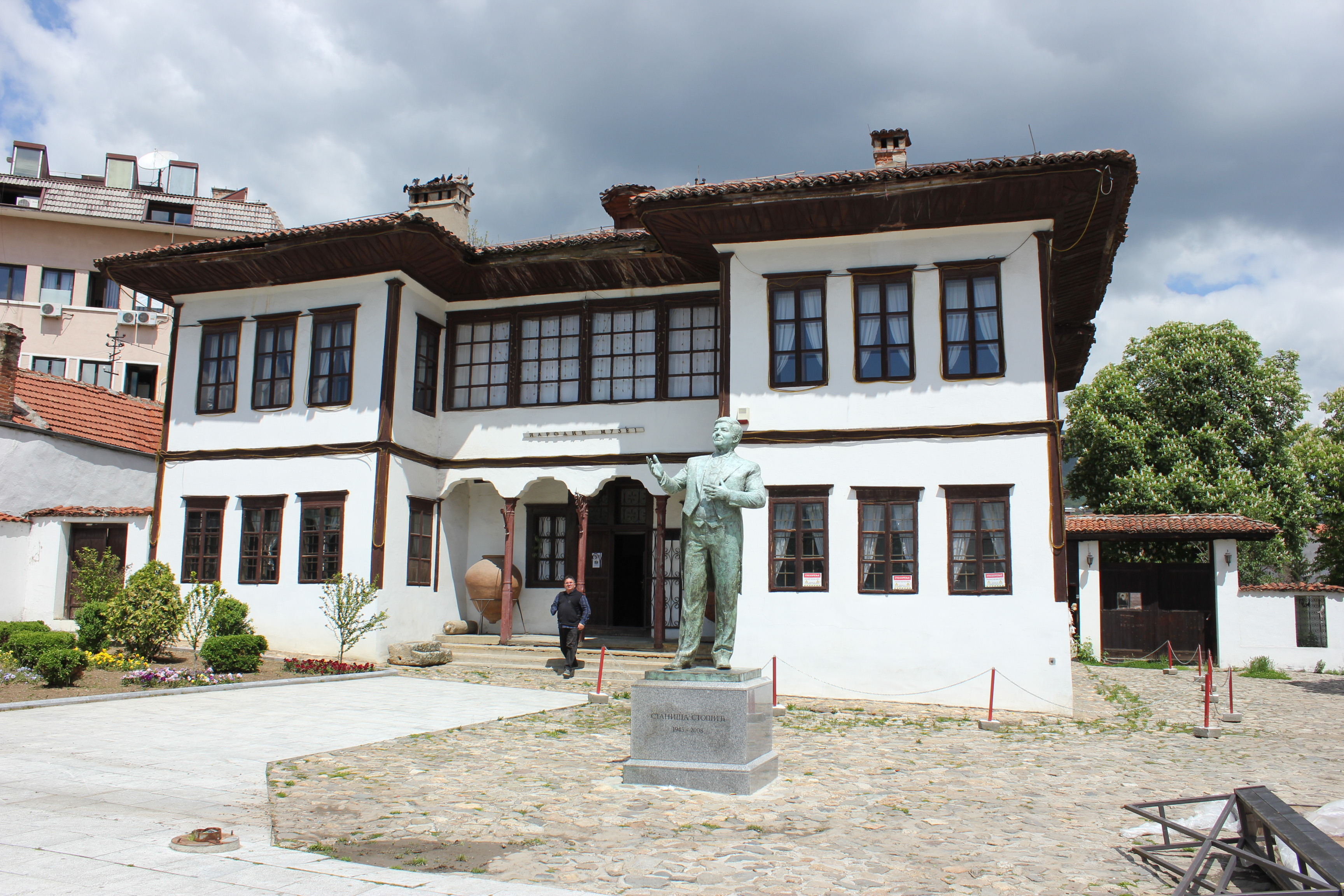 Народният музей в град Враня, Сърбия. Разположен в сграда от Пашиния конак.